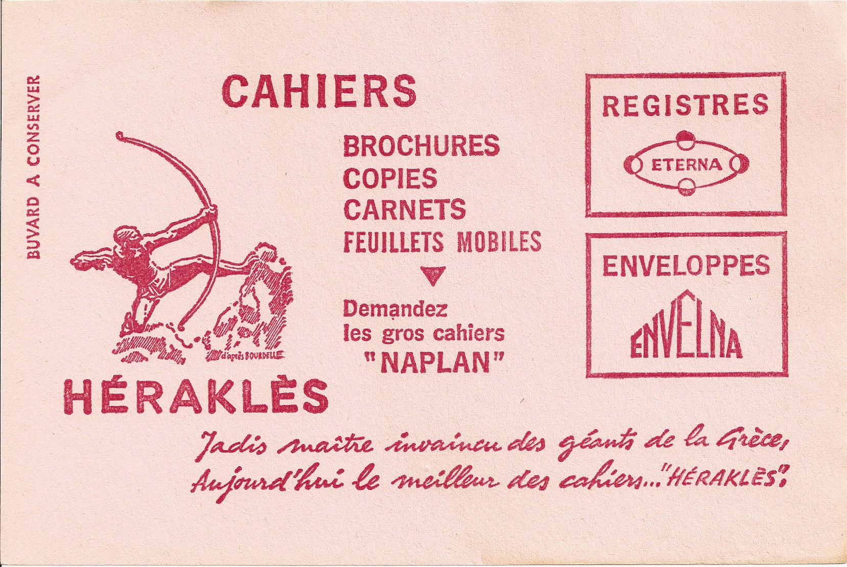 Buvard publicitaire cahier Héraklès